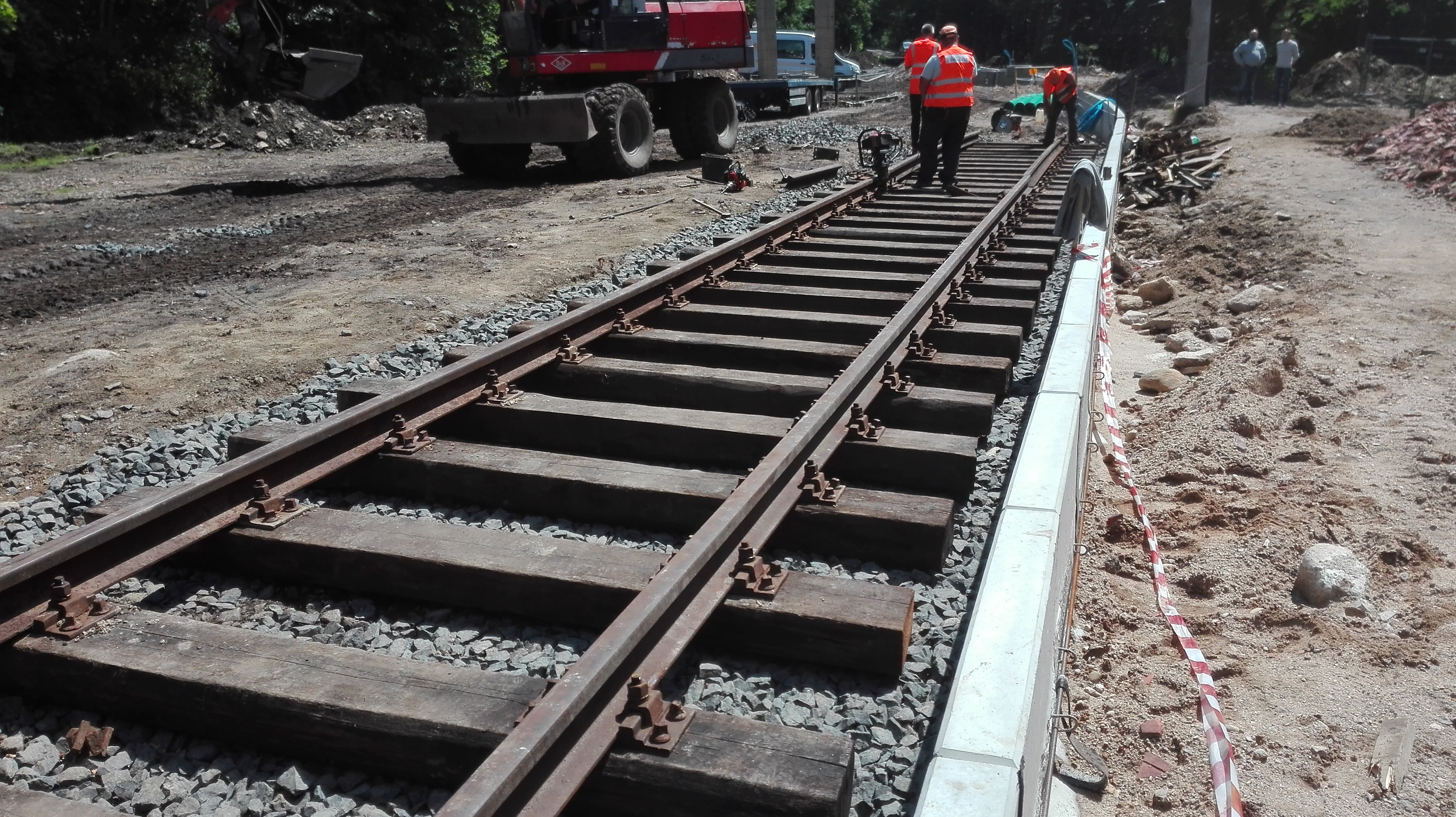 Prace przy torze ekspozycyjnym.